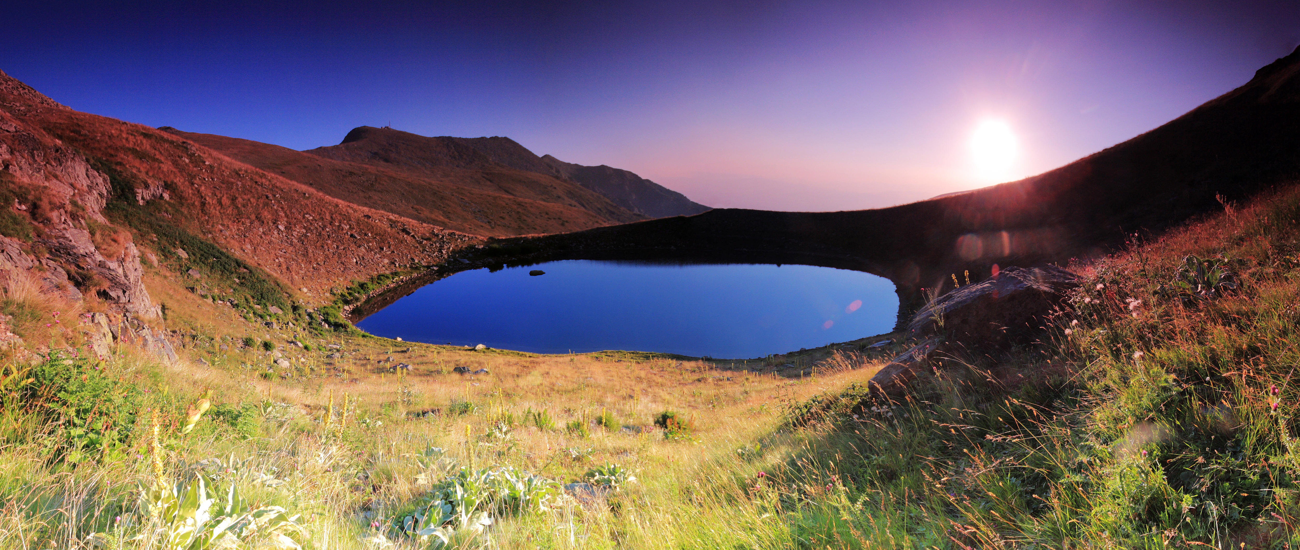 Malo ezero, Pelister izgrejsonce